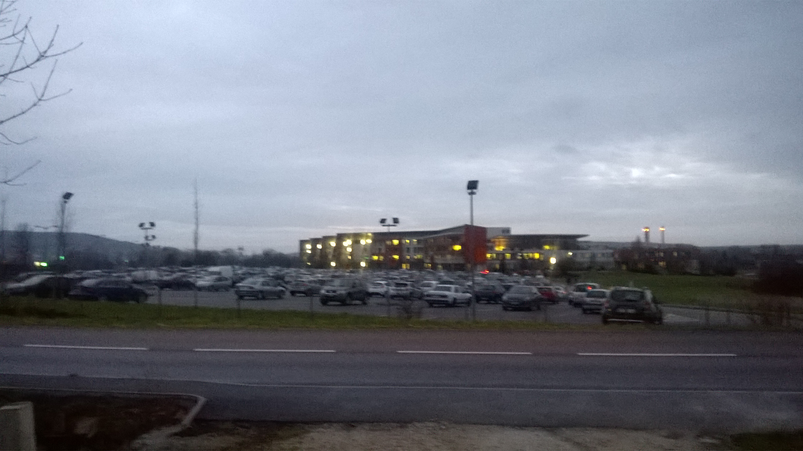 Le site de Vesoul du CHI de Haute-Saône